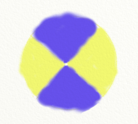 Bild zur Simulation des Haidinger-Büschel